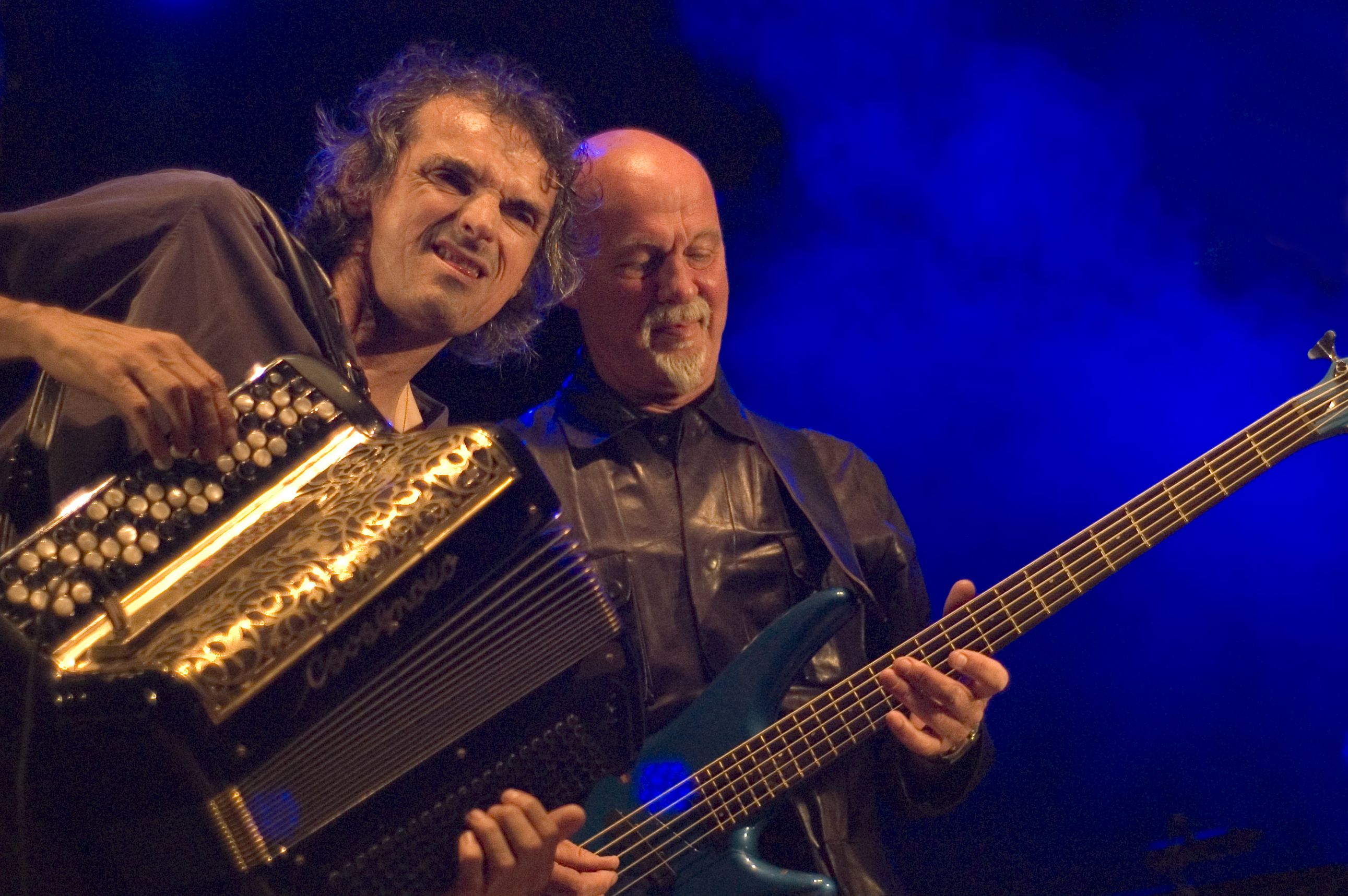 Niort (France) 2011